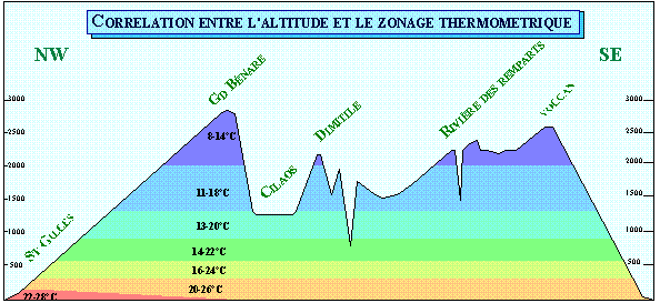 Zonage thermique ile reunion. Variation temperature avec altitude